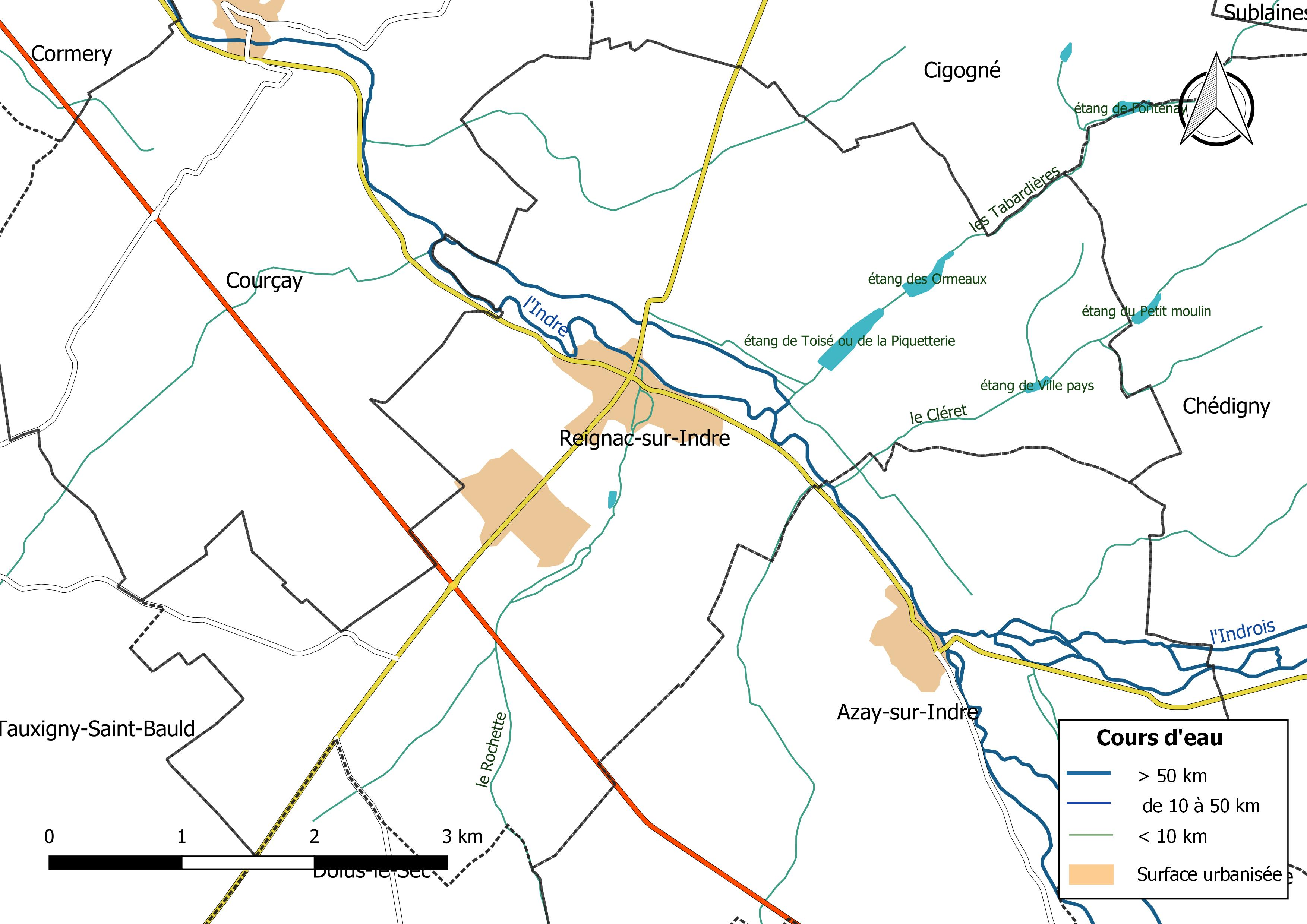 Carte du réseau hydrographique de la commune de Reignac-sur-Indre (France).